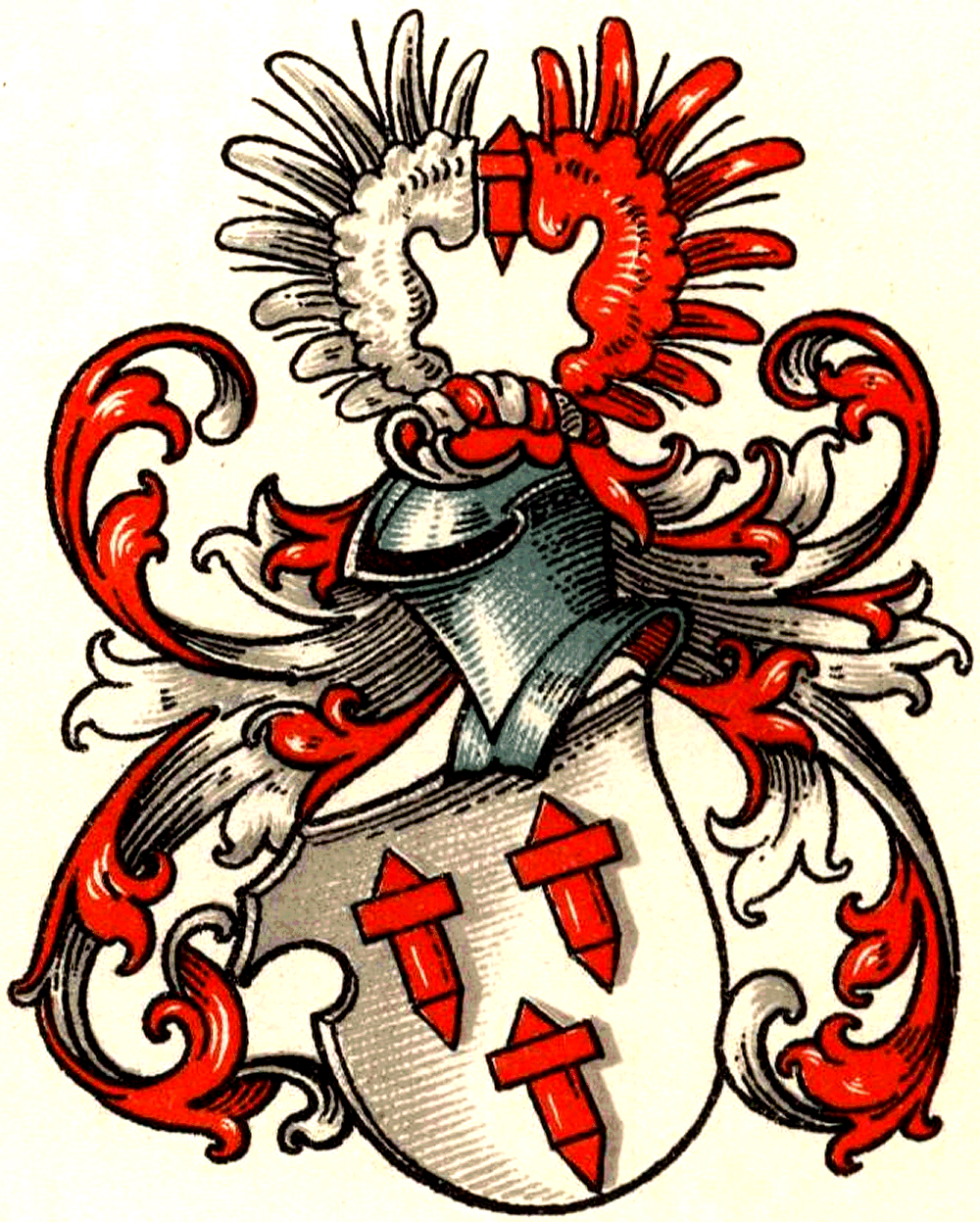 Wappen der Herren von Haren